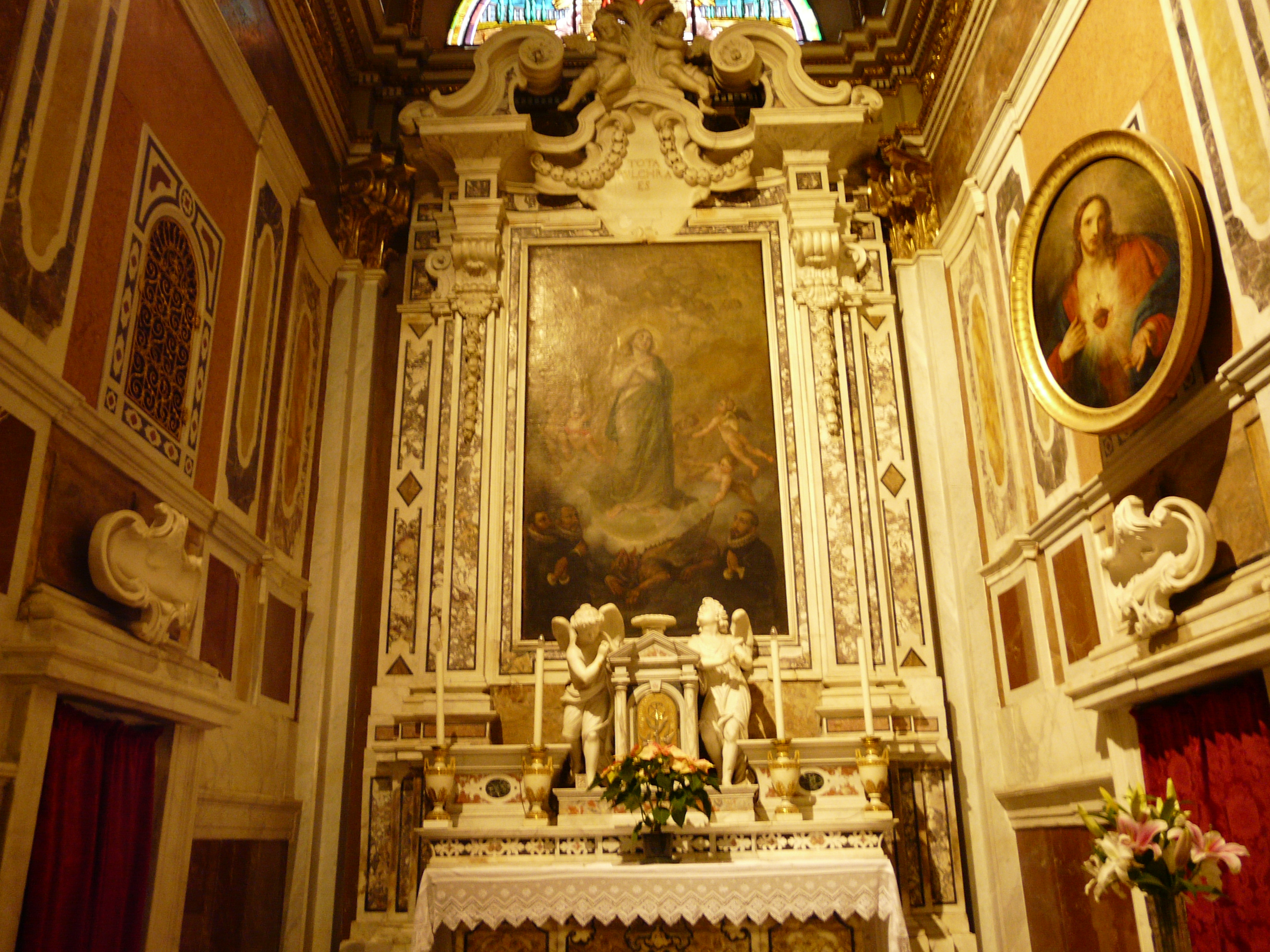 Dipinto della Basilica di Santa Margherita, Comune di Santa Margherita Ligure, Liguria, Italia